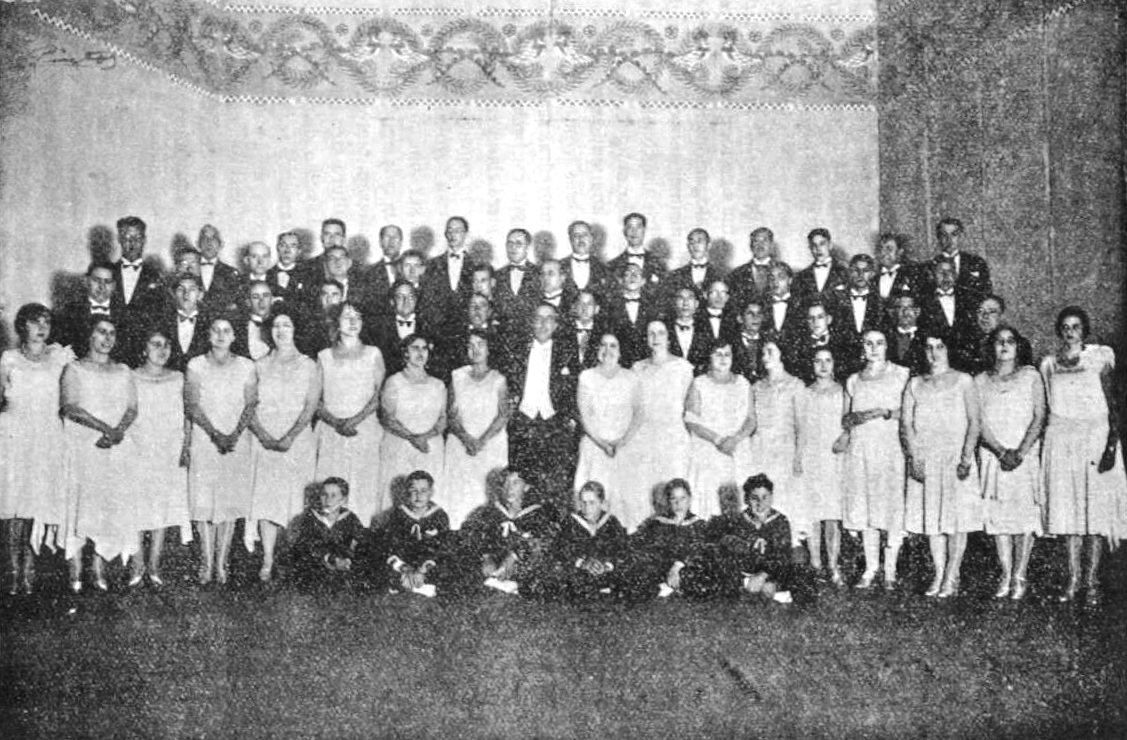 Sociedad Coral Polifónica de Pontevedra